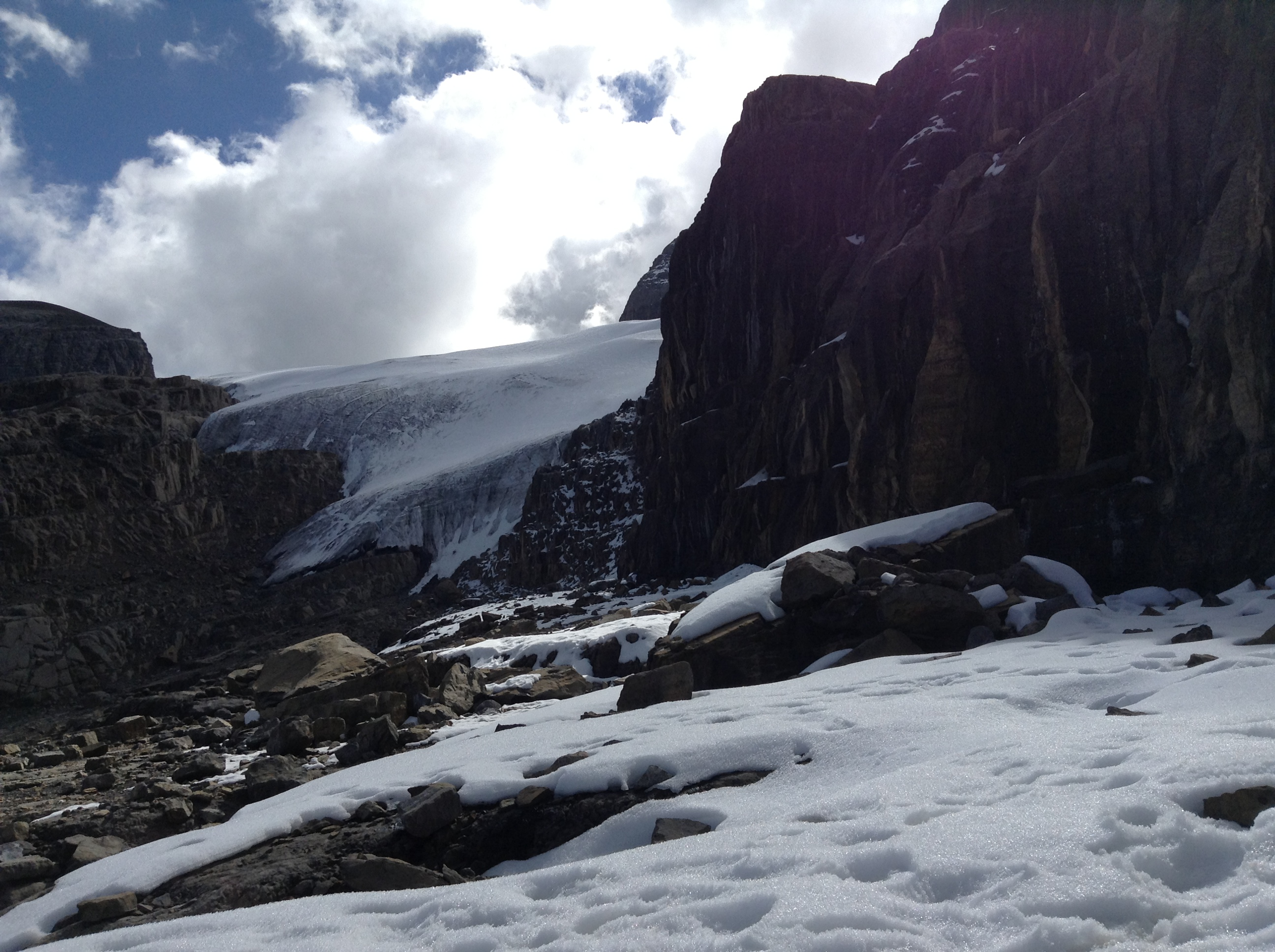 Abancay Province, Peru